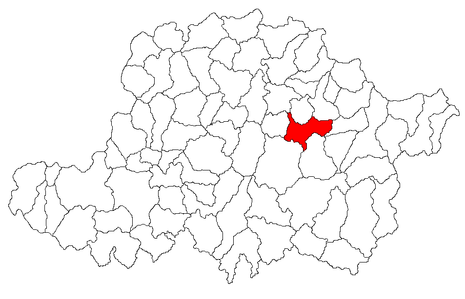 Categorie:Hărţi ale judeţului Arad